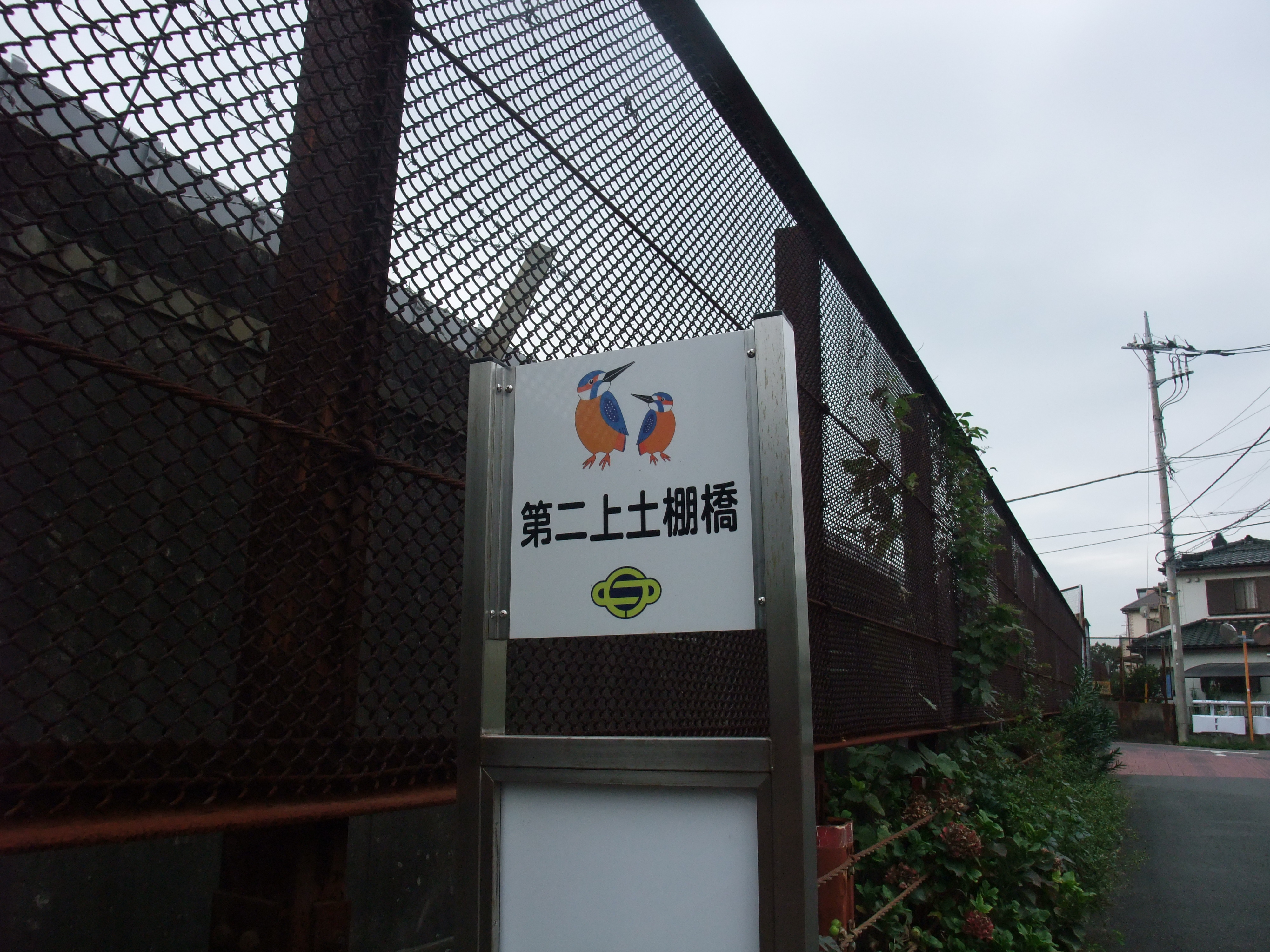 東海道新幹線を渡る第2上土棚跨線橋脇にある綾瀬市コミュニティバスの停留場（綾瀬市）